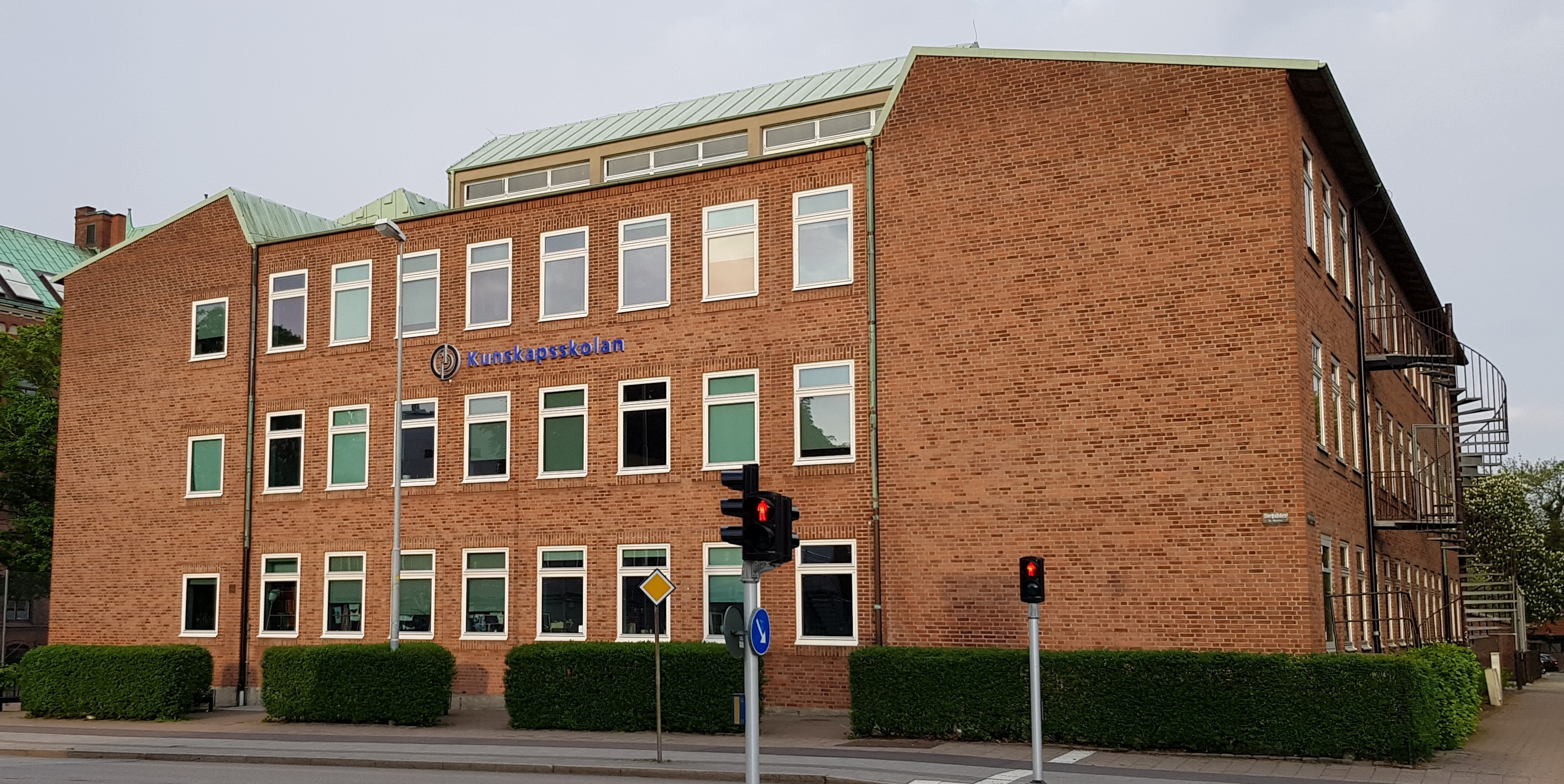 Kunskapsskolan i Helsingborg.